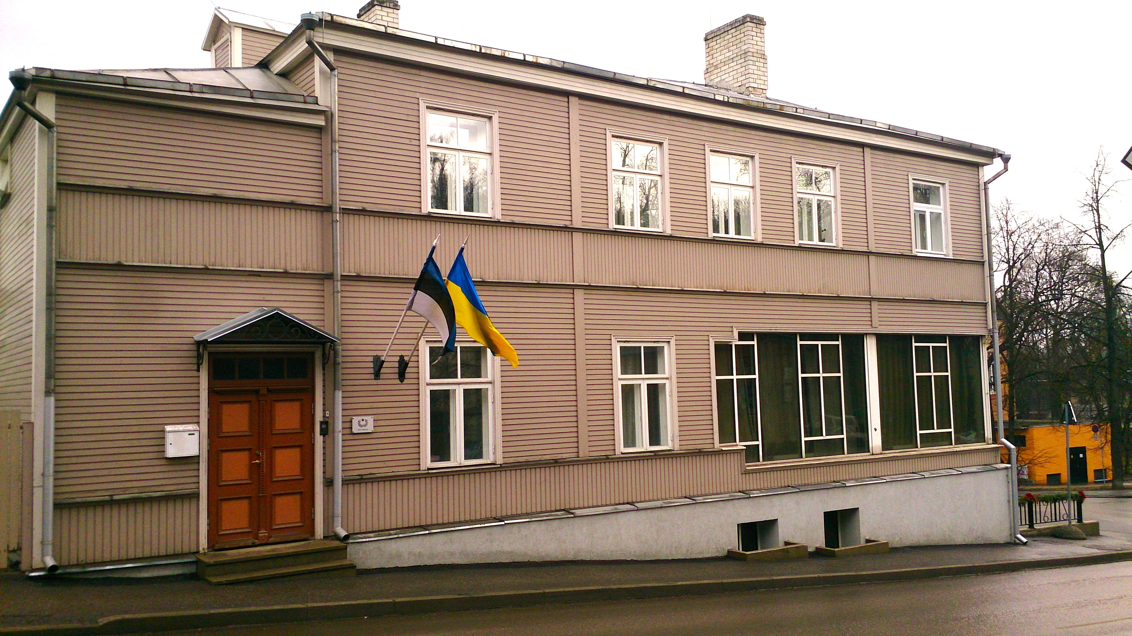 Tartu, Jakobi 23. EÜS Põhjala.